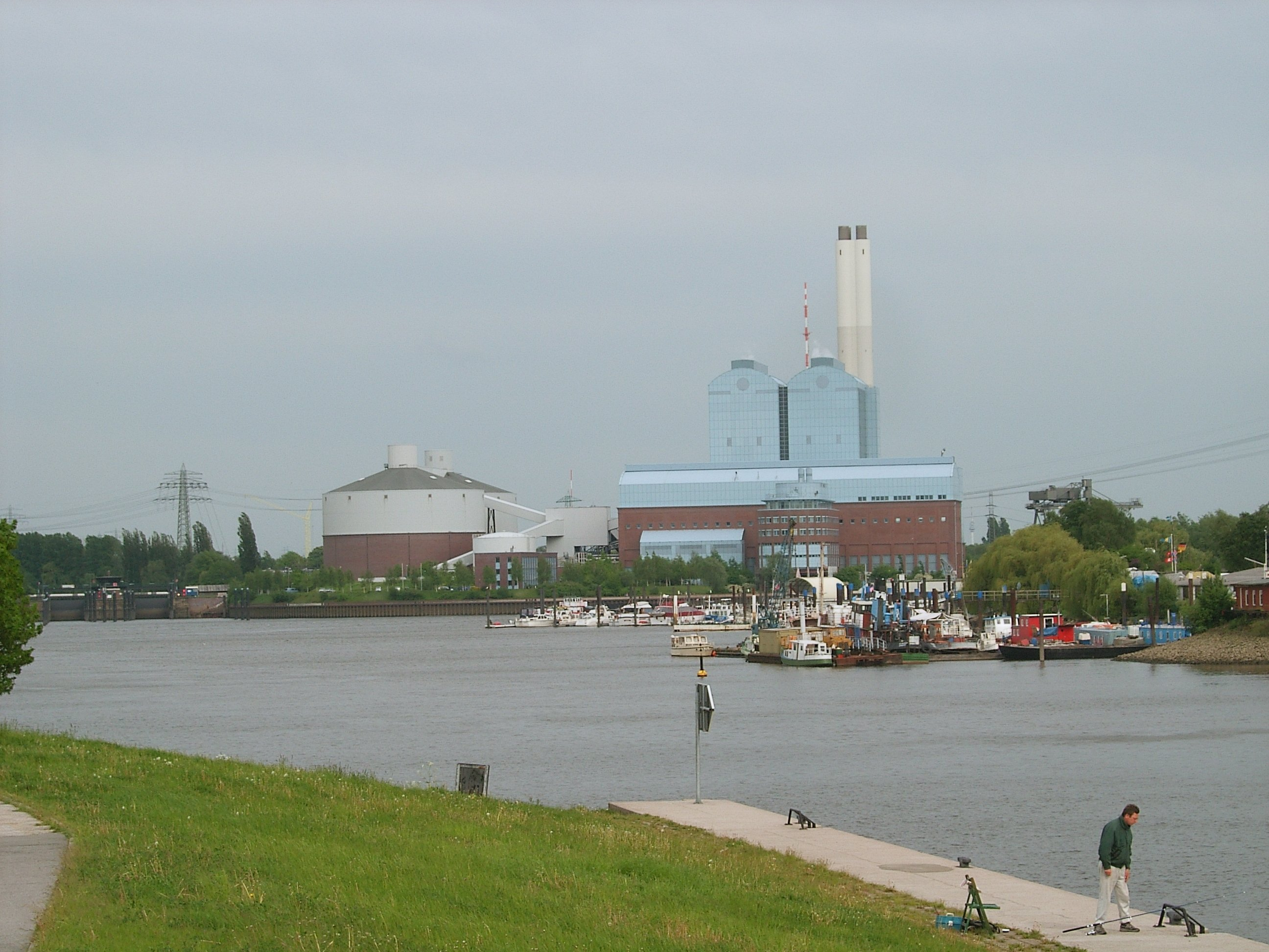 Hamburg, Tiefstack, Kraftwerk (Blick von der Kaltehofe über die Billwerder Bucht)